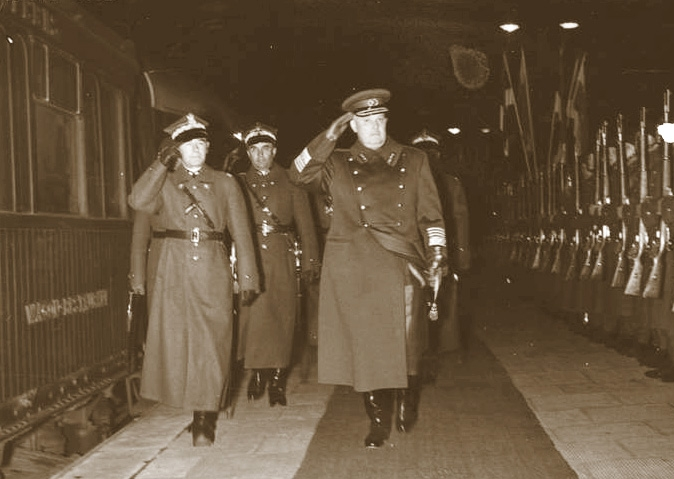 Naczelny wódz armii estońskiej generał Johan Laidoner przechodzi przed frontem kompanii honorowej na Dworcu Wschodnim w Warszawie. Obok widoczny marszałek Edward Rydz-Śmigły, za nim minister spraw wojskowych gen. dyw. Tadeusz Kasprzycki.